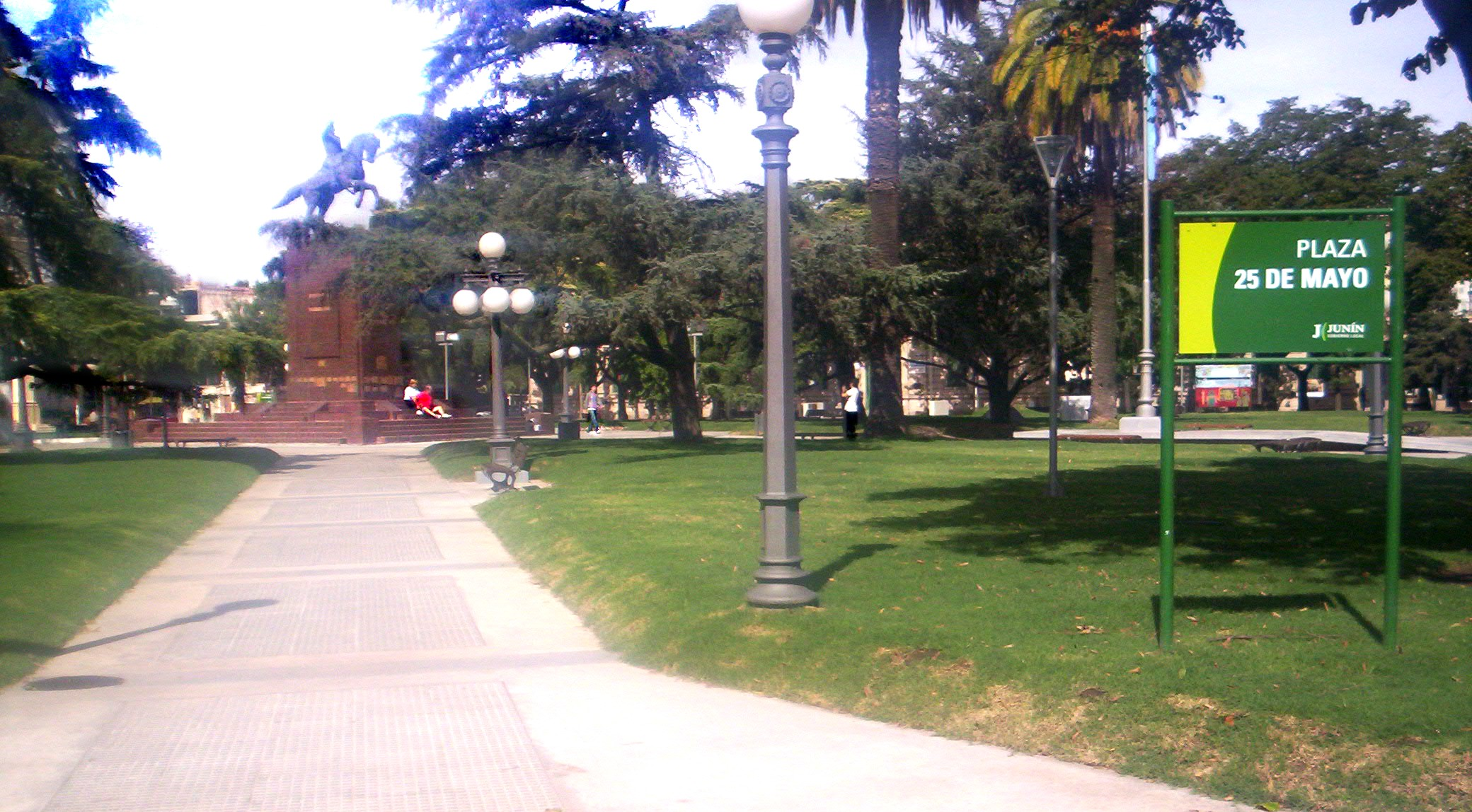 Plaza 25 de Mayo, en Junín, Argentina.